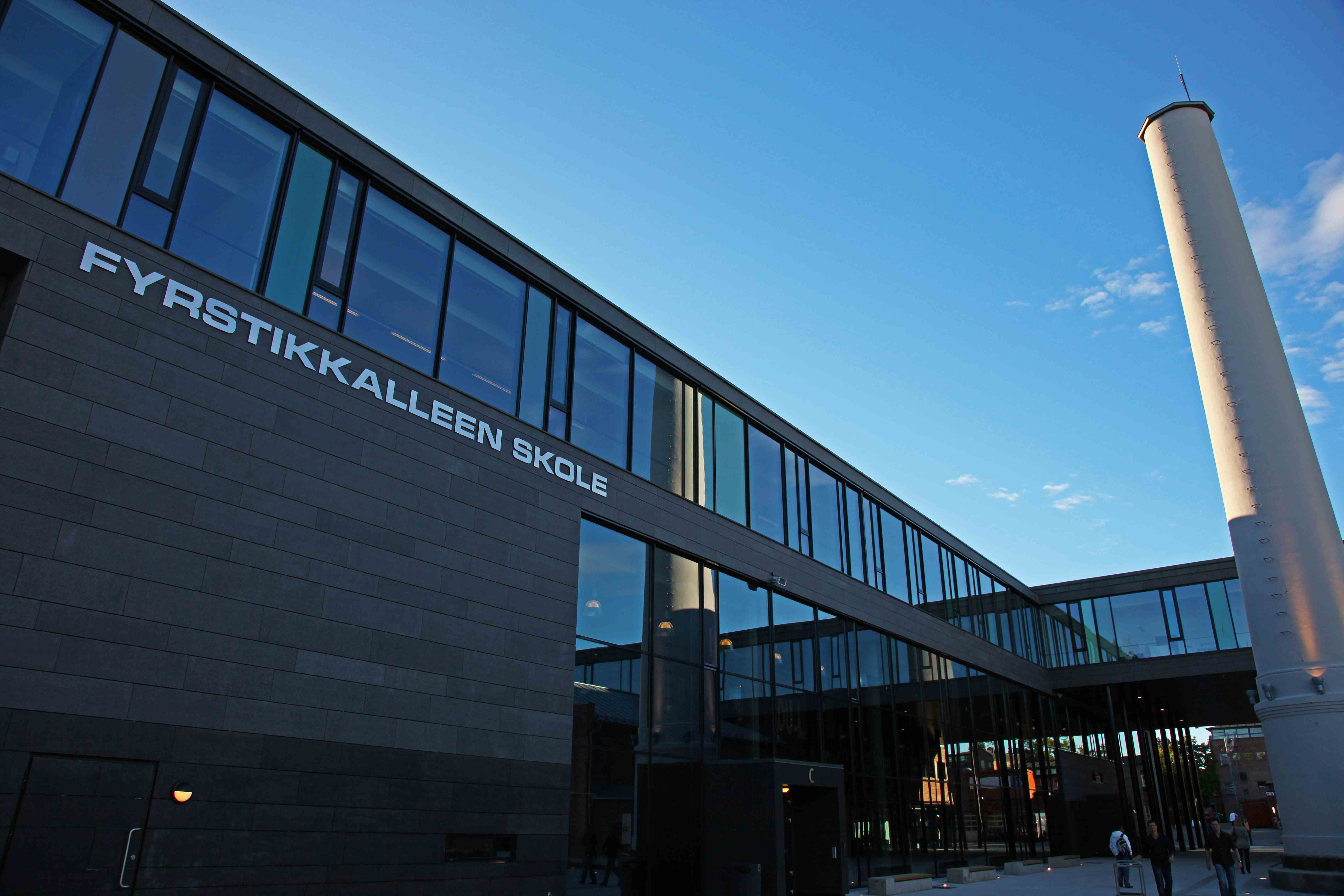 Fyrstikkallene skole i Oslo. Innviet høsten 2010. Beliggene ved Fyrstikktorget på Helsfyr.